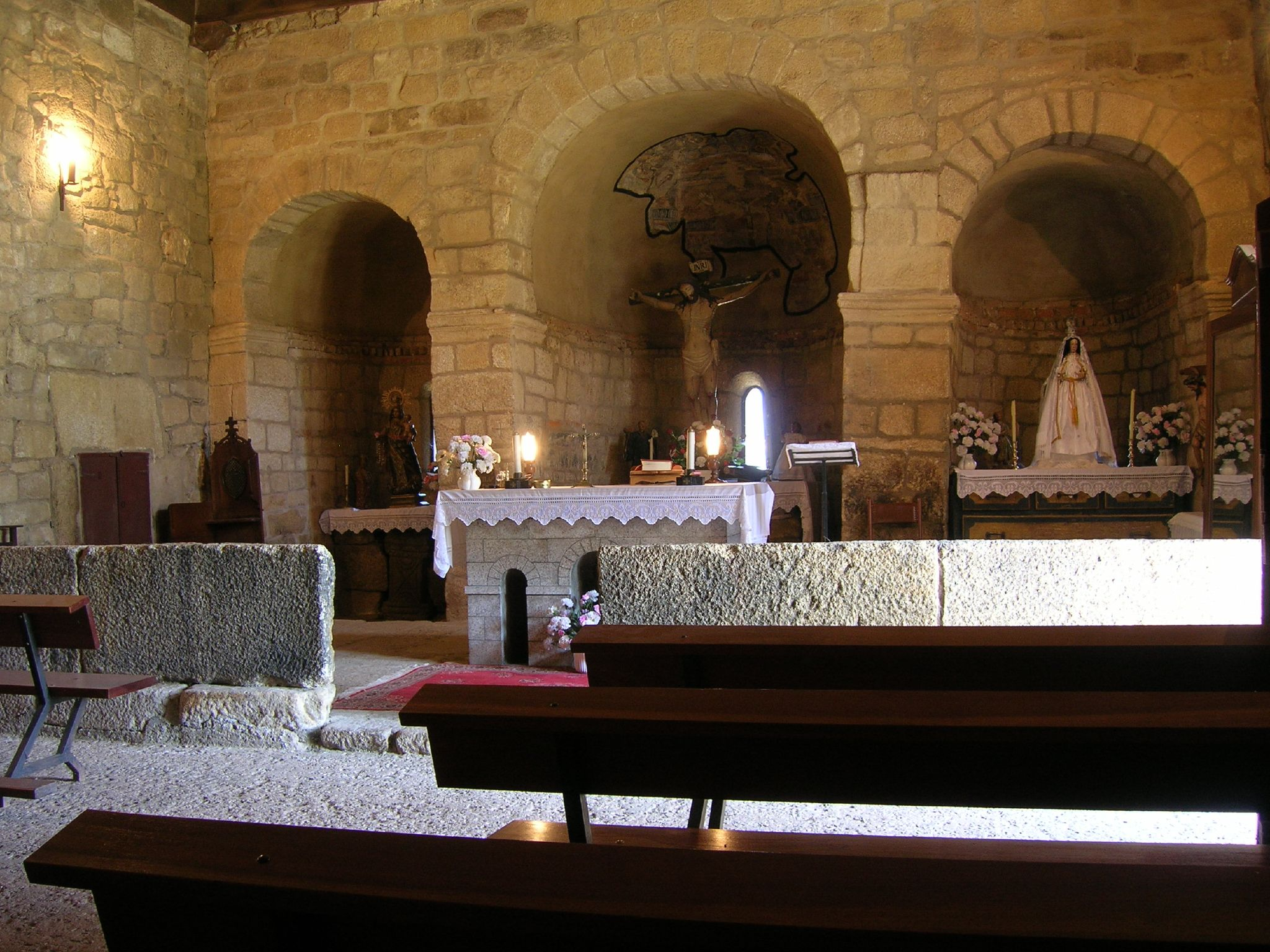 Es de planta basilical (originariamente de tres naves) con tres ábsides, los laterales rectangulares y el central cuadrado, con una ventana cada uno.